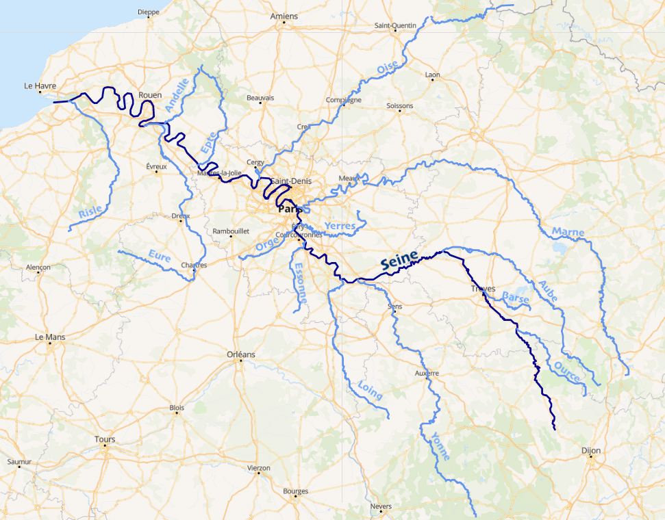 carte réalisée sur umap This map may be incomplete, and may contain errors. Don't rely solely on it for navigation.